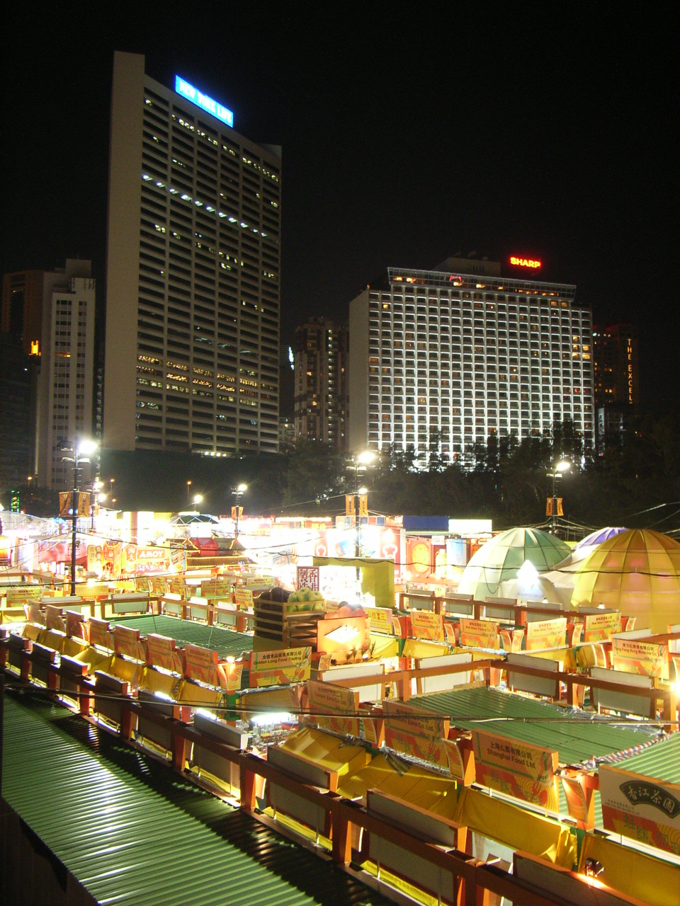 By Annie Zheng.